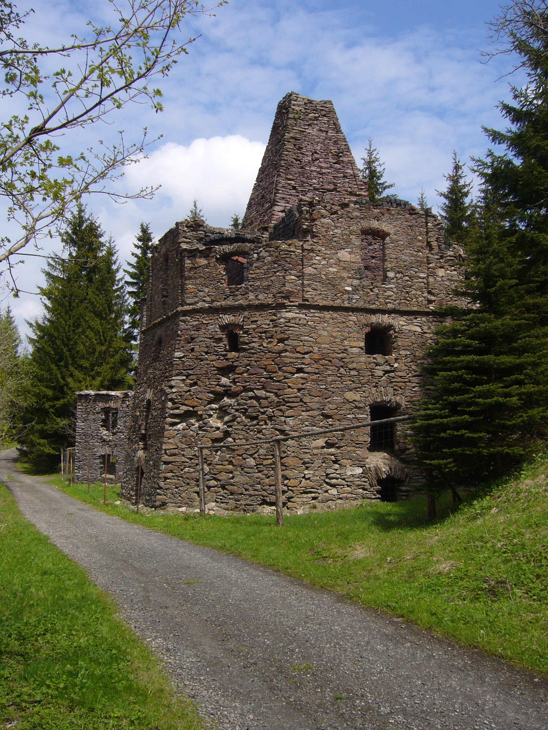 Stará vápenka u Kovářské